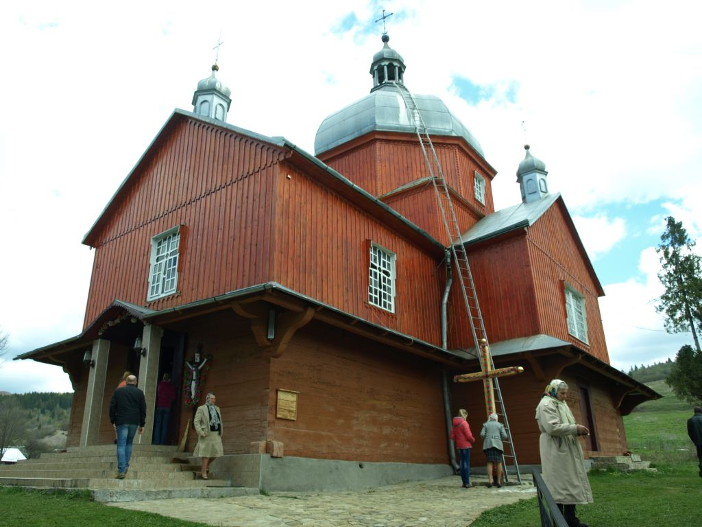 Cerkiew Św.Mikołaja w Uryczu z 1911 r.